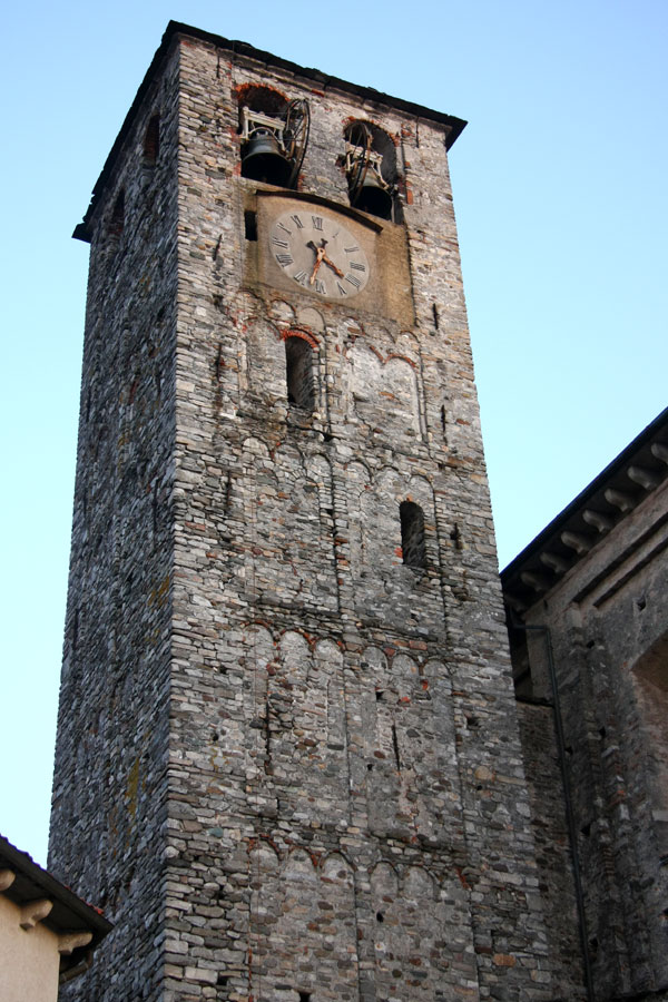 Campanile romanico (XII secolo) della Basilica di San Giuliano a Gozzano (NO)